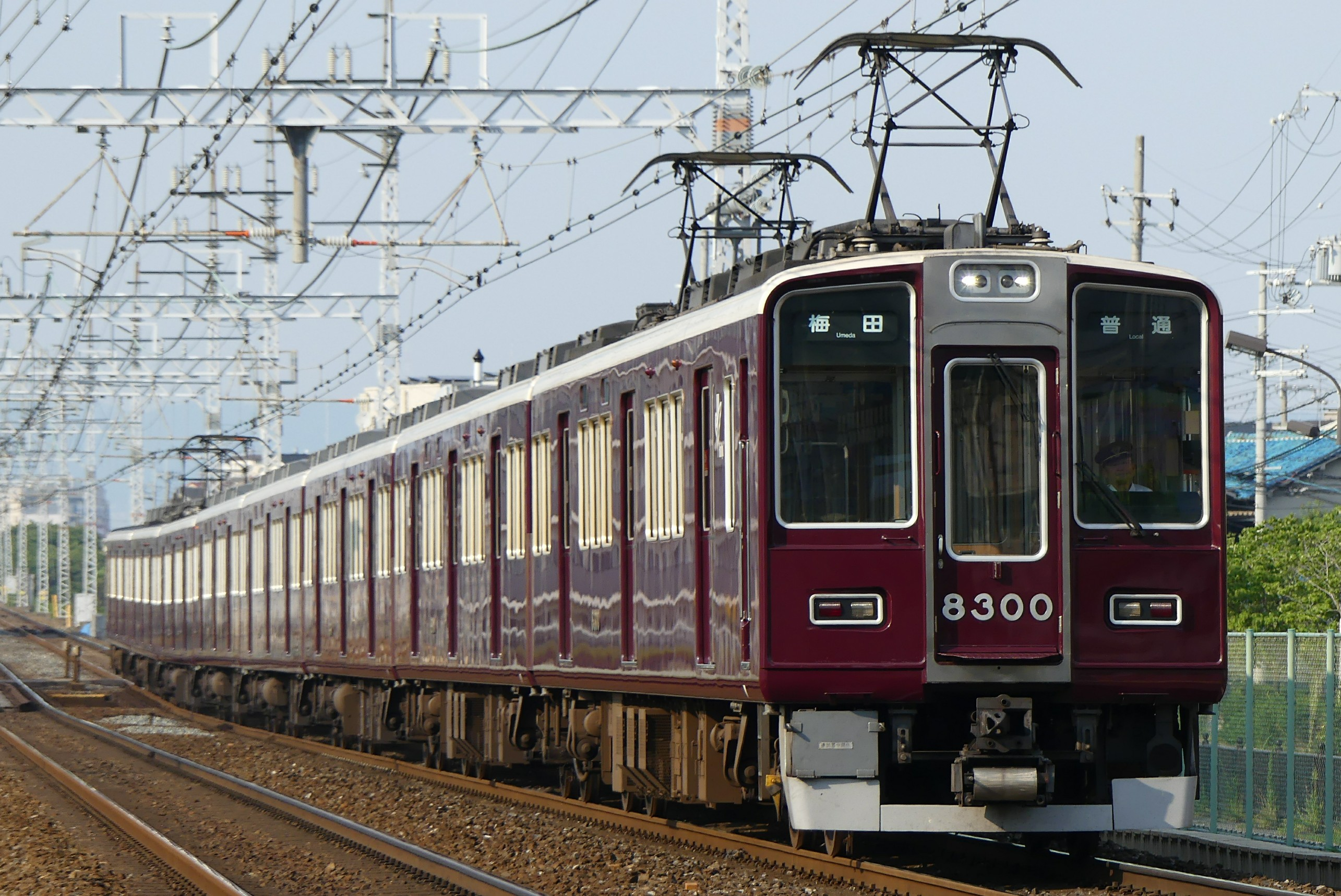 阪急電鉄8300系電車